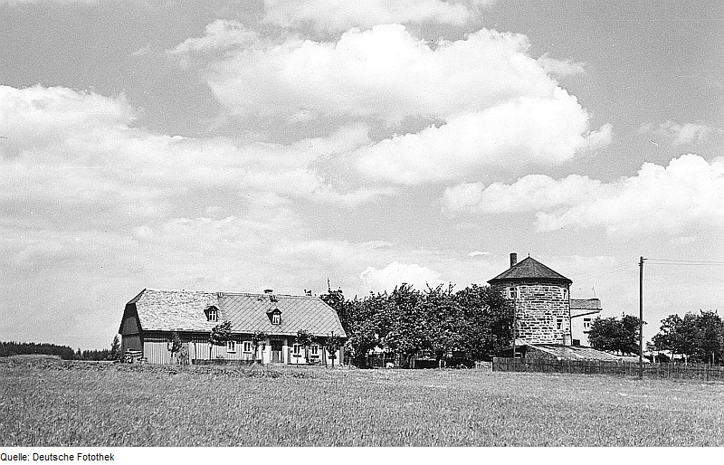 Original image description from the Deutsche Fotothek Beiersdorf. Blick zum Windmühlengehöft